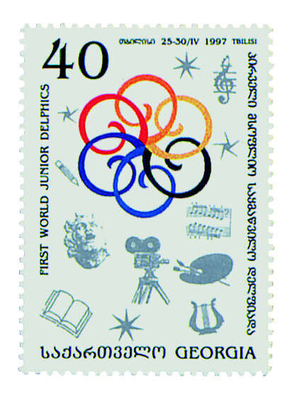 Offizielle Briefmarke zum II Delphische Weltkongress, 1997 Georgien